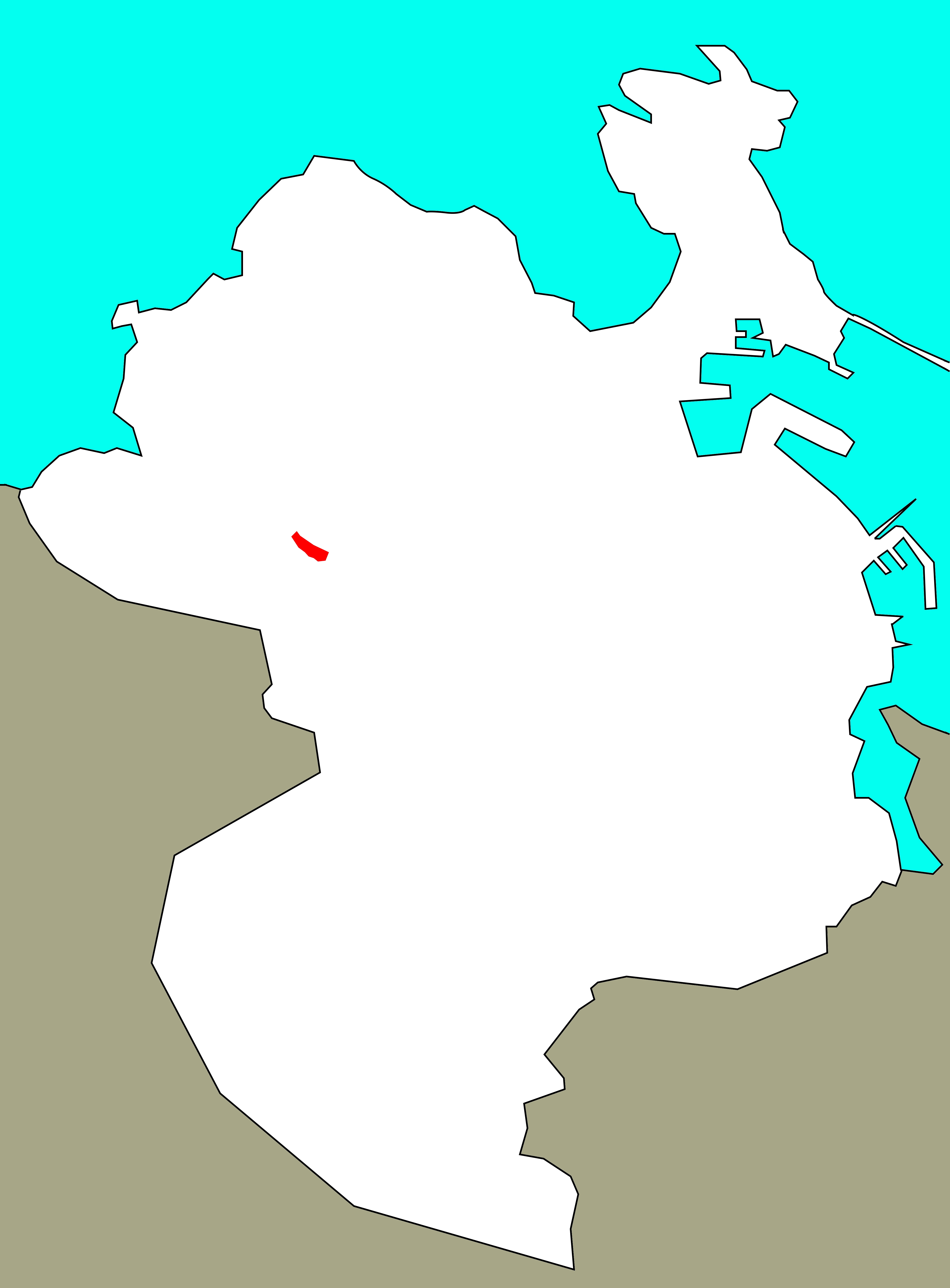 Situación da urbanización Gatón-Comeanda no concello da Coruña.[1]